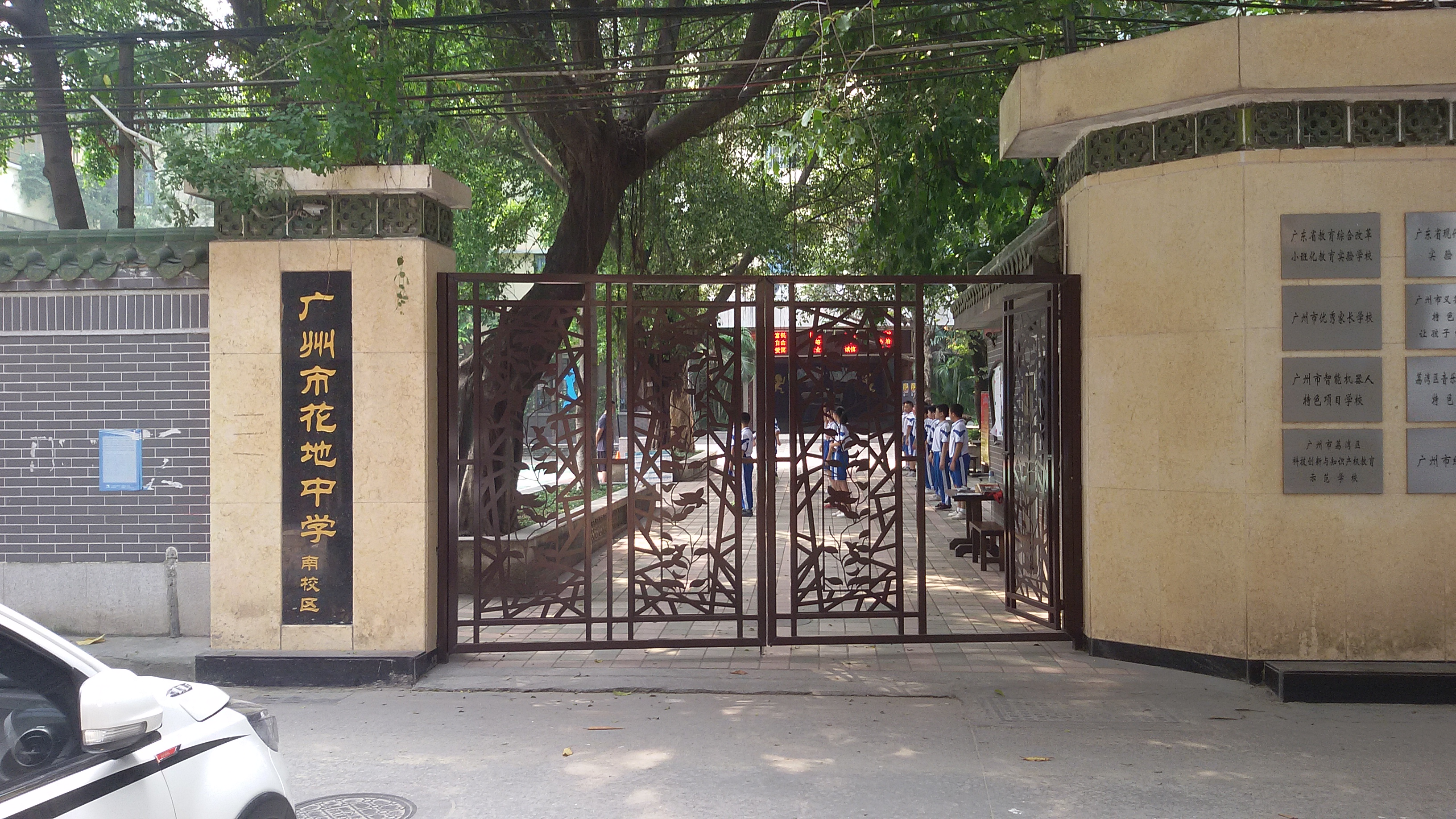 粵語: 廣州市花地中學（南校區）正門